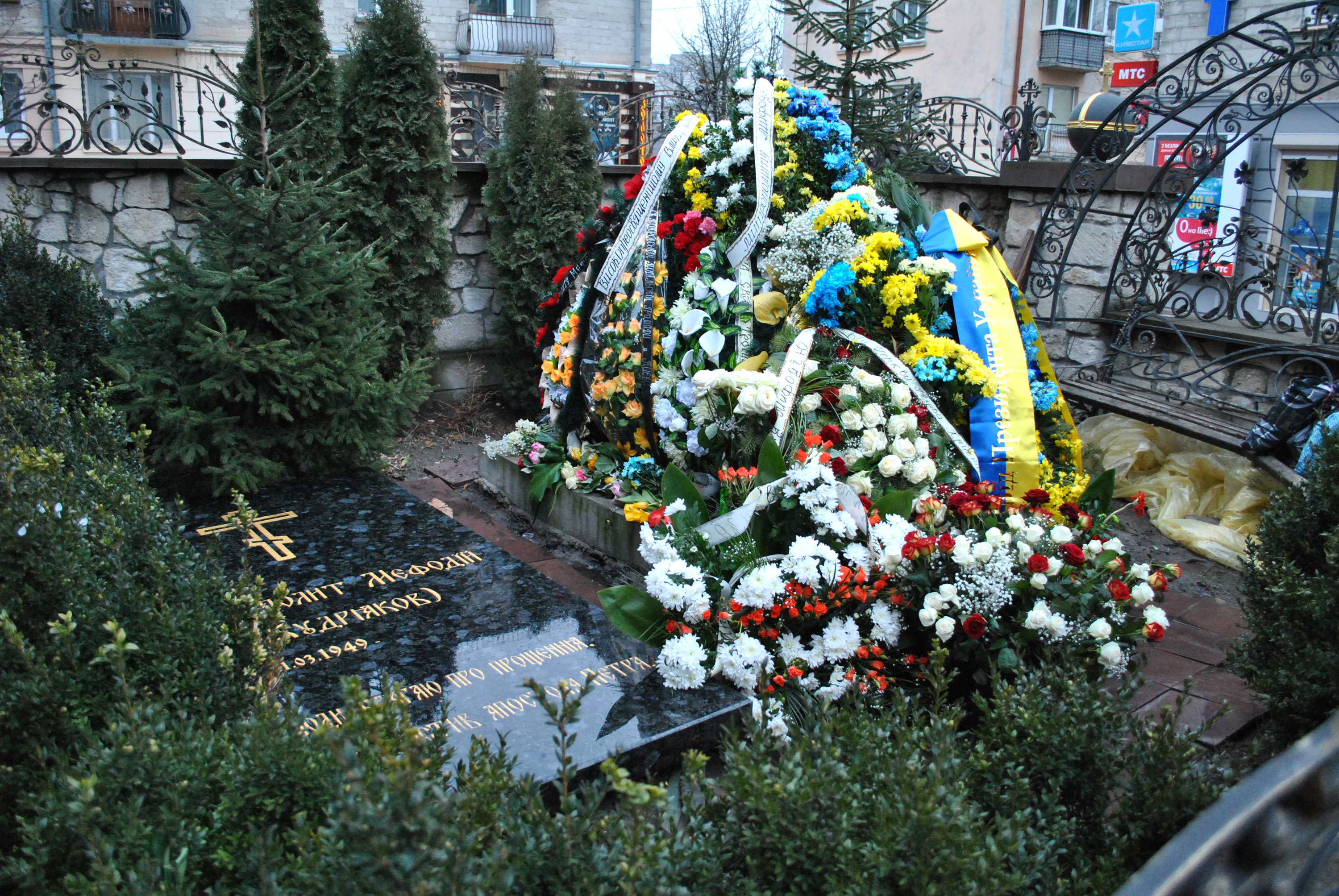 Могила предстоятеля Української автокефальної православної церкви, Митрополита Київського і всієї України Мефодія біля церкви Різдва Христового (м. Тернопіль).